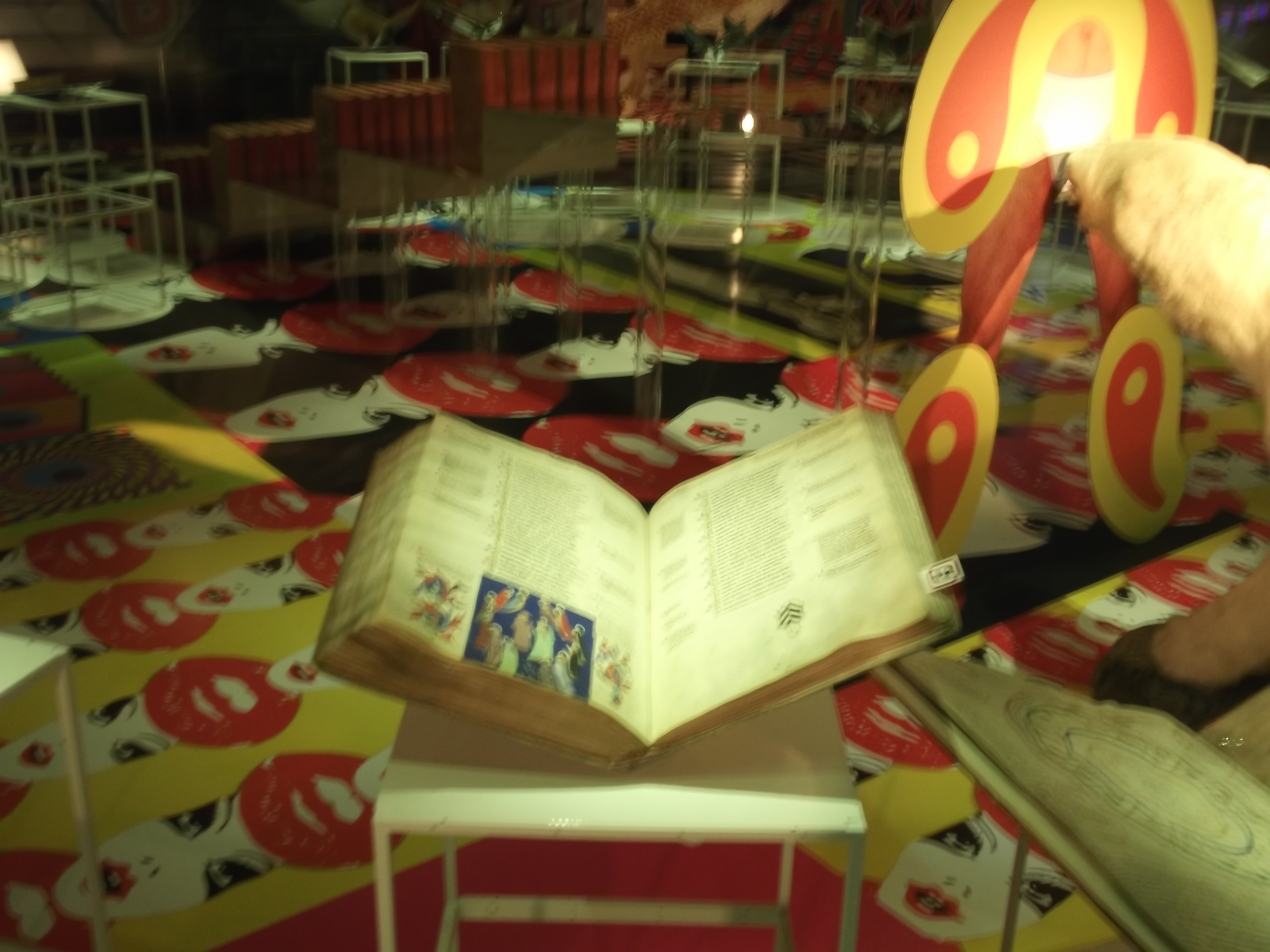 Thott 411 fol i Det Kongelige Biblioteks udstilling